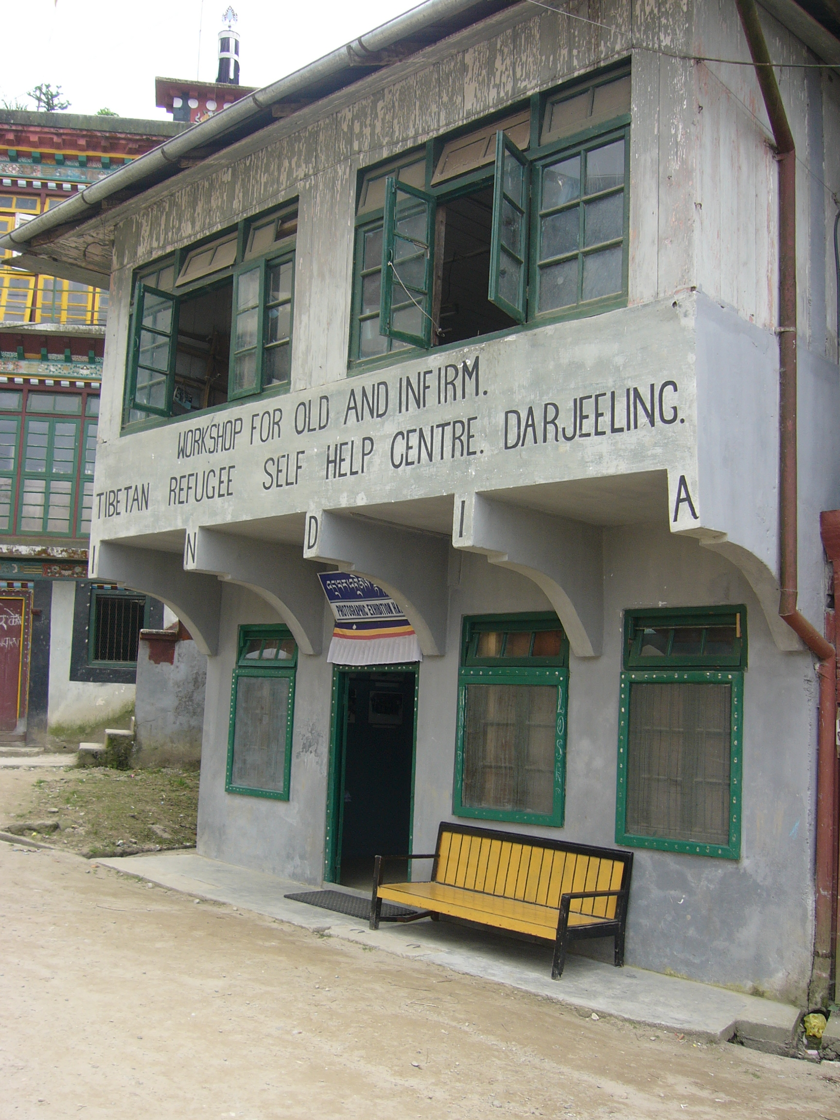 Tibetan Refugee Self Help Center Darjeeling West Bengal India